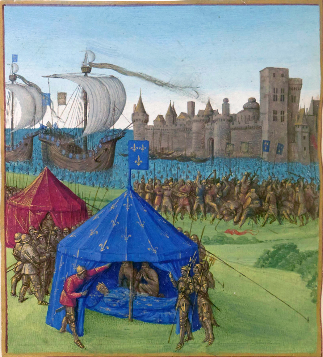 Mort de Saint LouisBataille de Tunis en 1270 Grandes Chroniques de France, enluminées par Jean Fouquet, Tours, vers 1455-1460Paris, BnF, département des Manuscrits, Français 6465, fol. 284v. (Livre de Philippe III le Hardi) Mort de Saint Louis:Le 25 août 1270, Saint Louis meurt sous sa tente fleurdelisée, devant la ville de Tunis. Bataille de Tunis en 1270 (en arrière-plan):La flotte de Charles d'Anjou, frère de Saint Louis, arrive dans la baie de Tunis. Ces renforts permettront à l'armée du roi de France, commandée par Charles d'Anjou, de remporter la victoire sur les sarrasins devant la ville de Tunis le 4 septembre 1270.